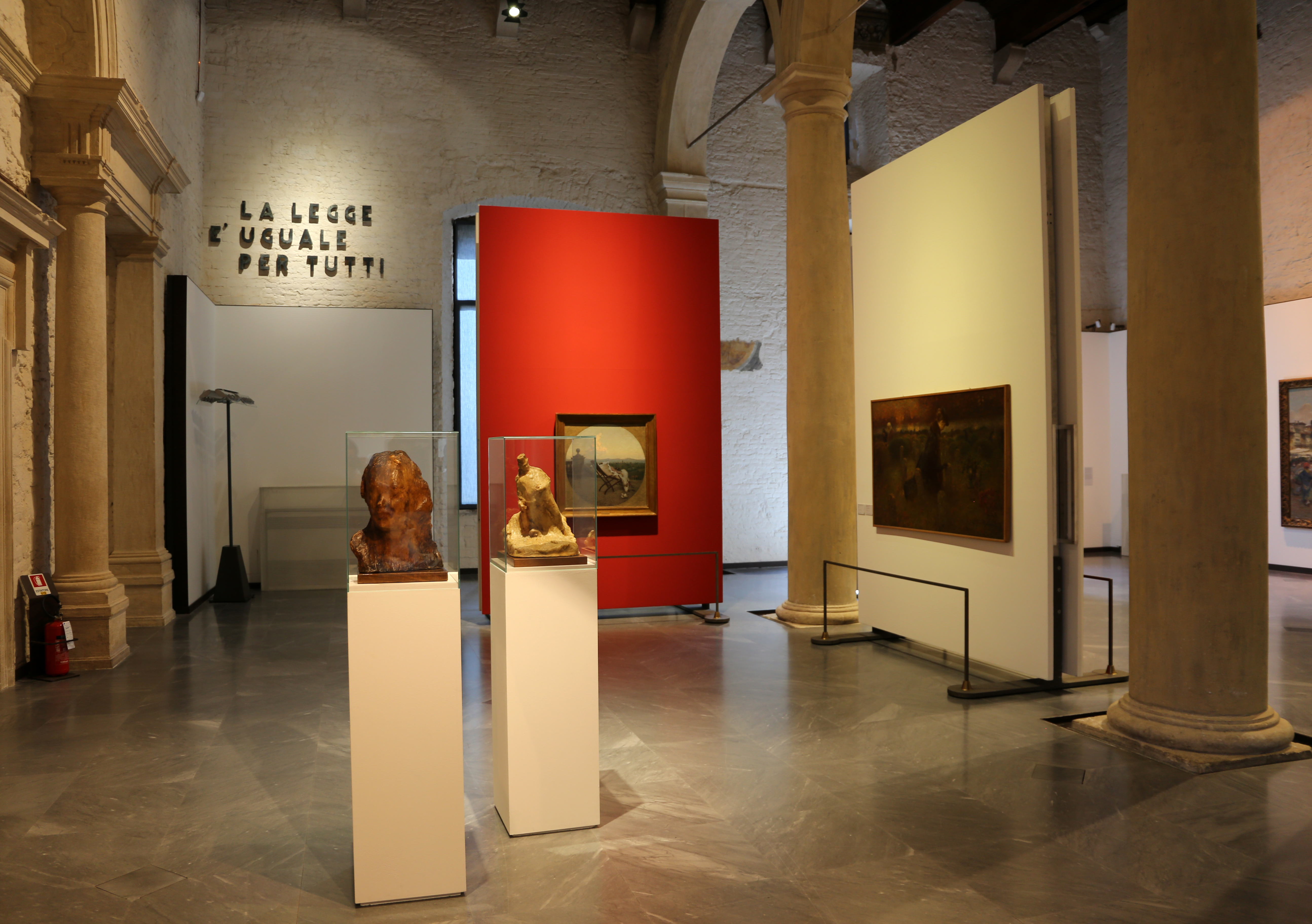 Galleria d'arte moderna Achille Forti This is a photo of a monument which is part of cultural heritage of Italy.